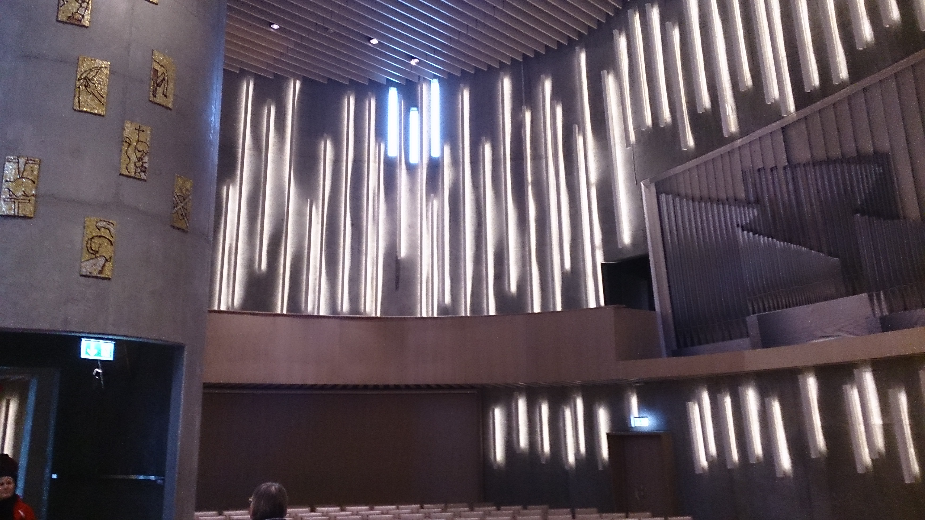 Insidan av Nordlyskatedralen